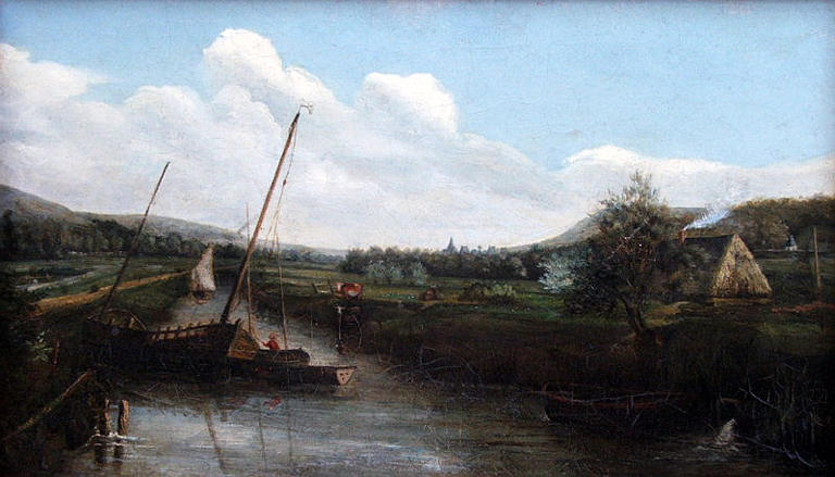 Vue du château d'Eu depuis la Bresle canalisée